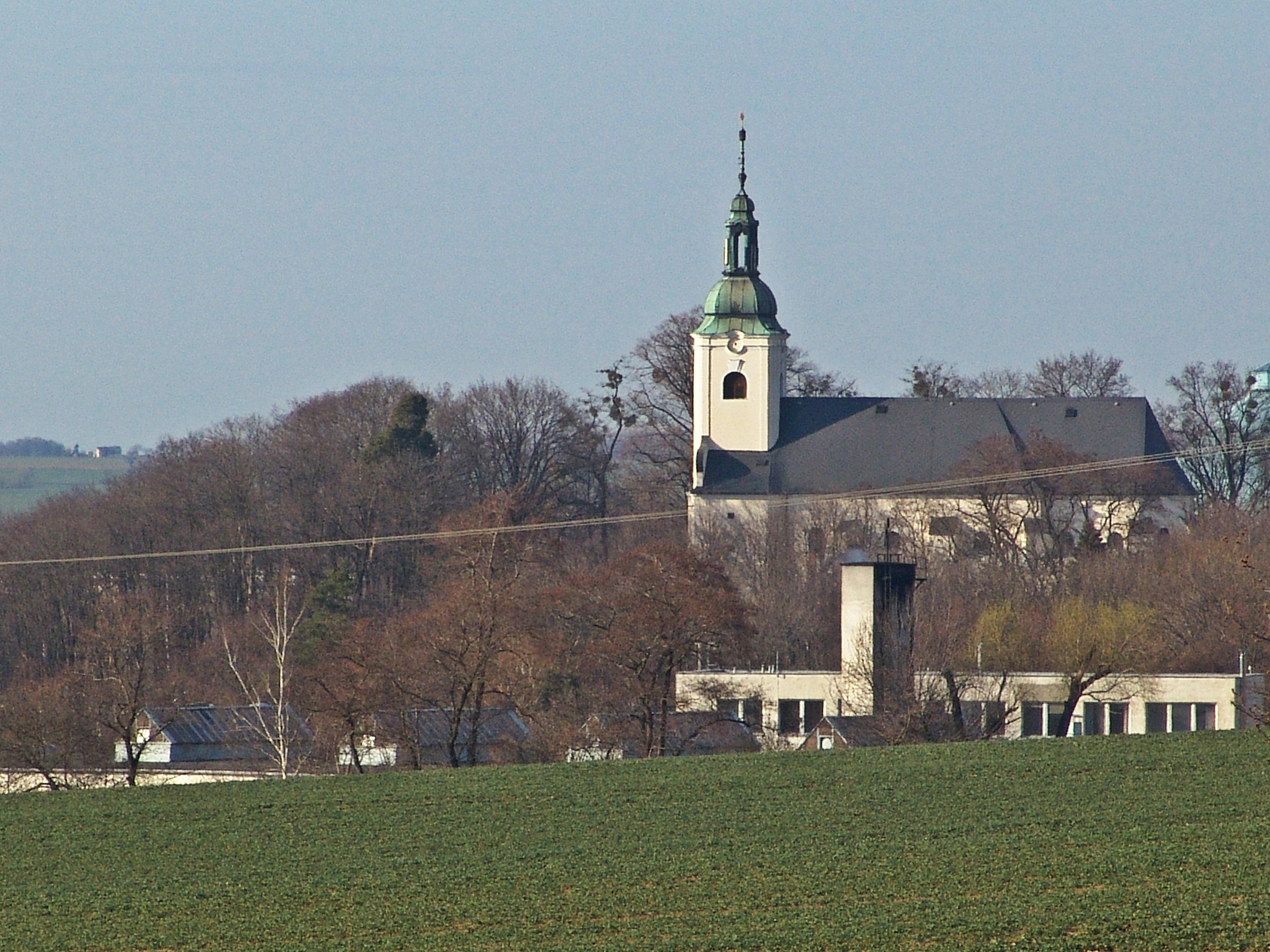 Kostel svatých Petra a Pavla, Pavlovského, Jaktař, Opava.